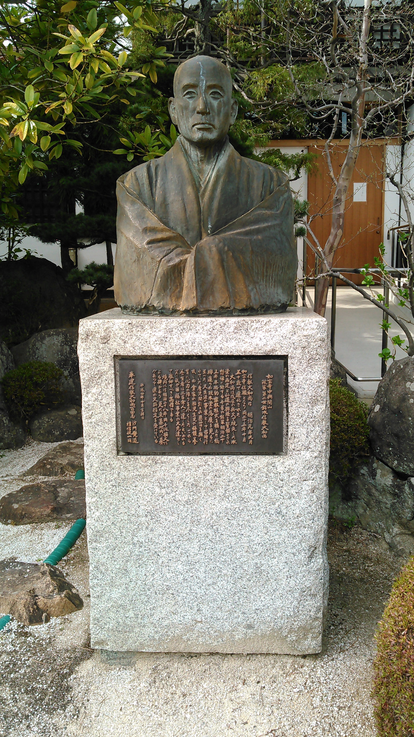 如宝寺 境内の鈴木信教像